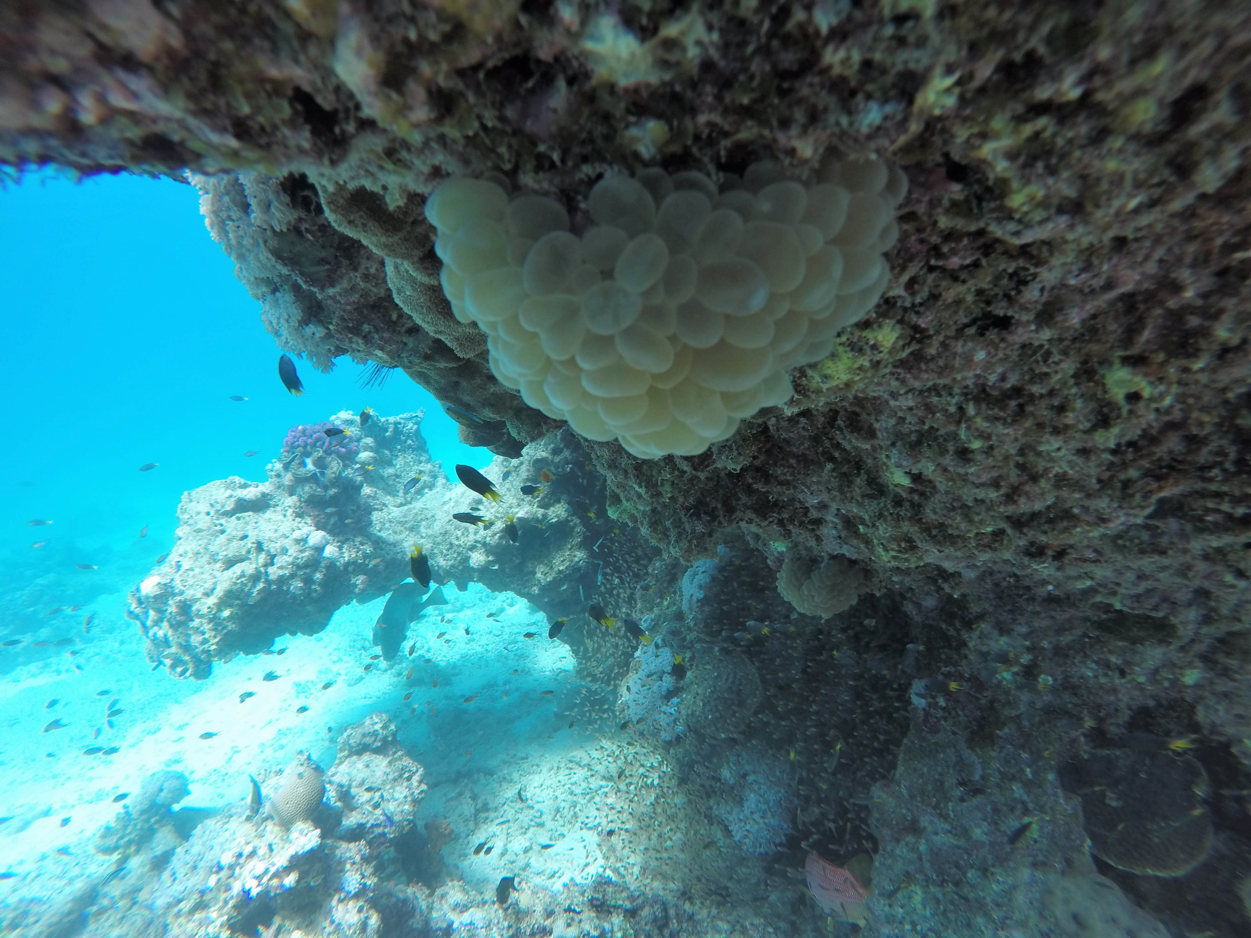 Plerogyra sinuosa, Thuwal, Arabia Saudí, mar Rojo.